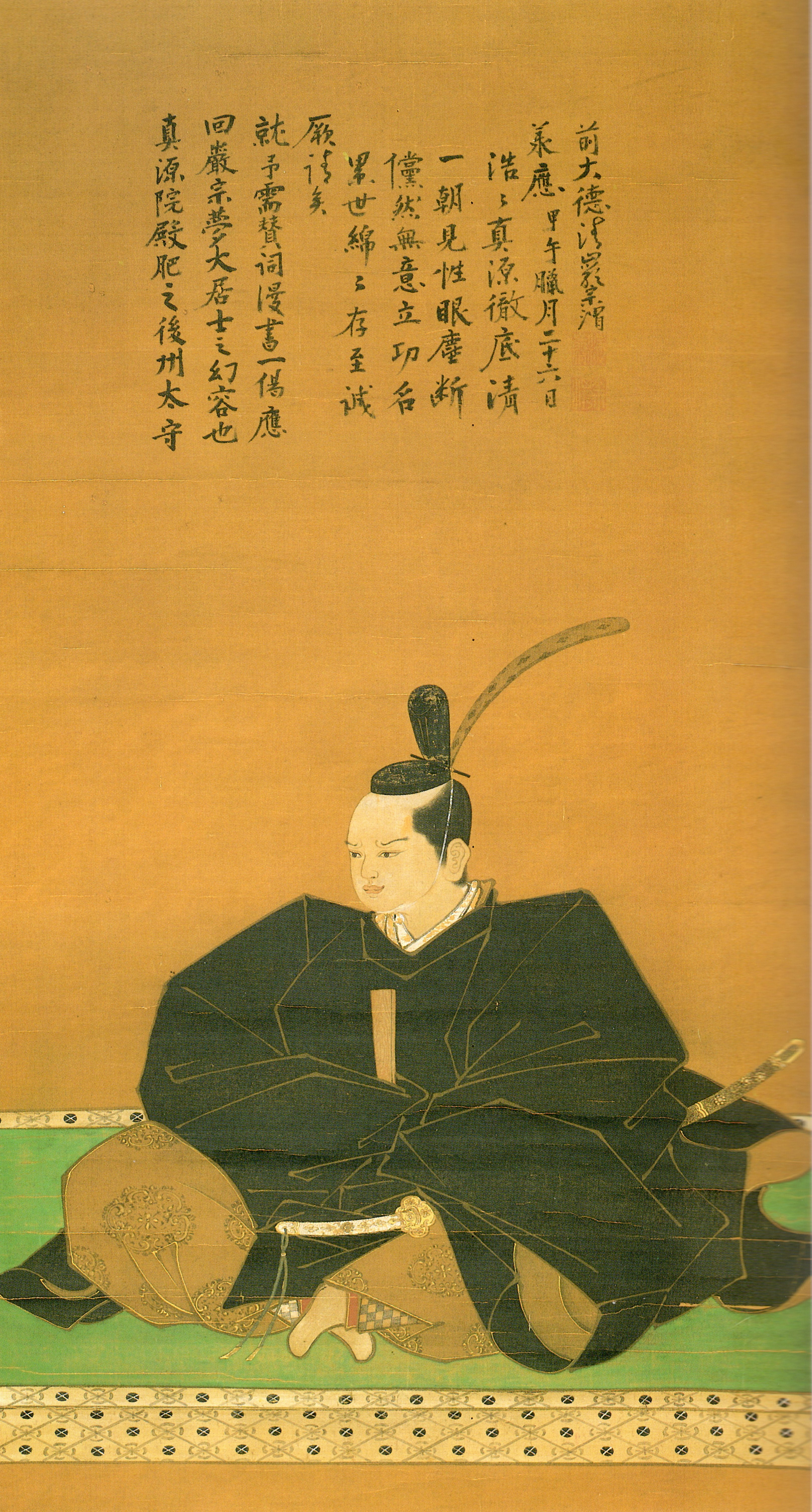 細川光尚の肖像。